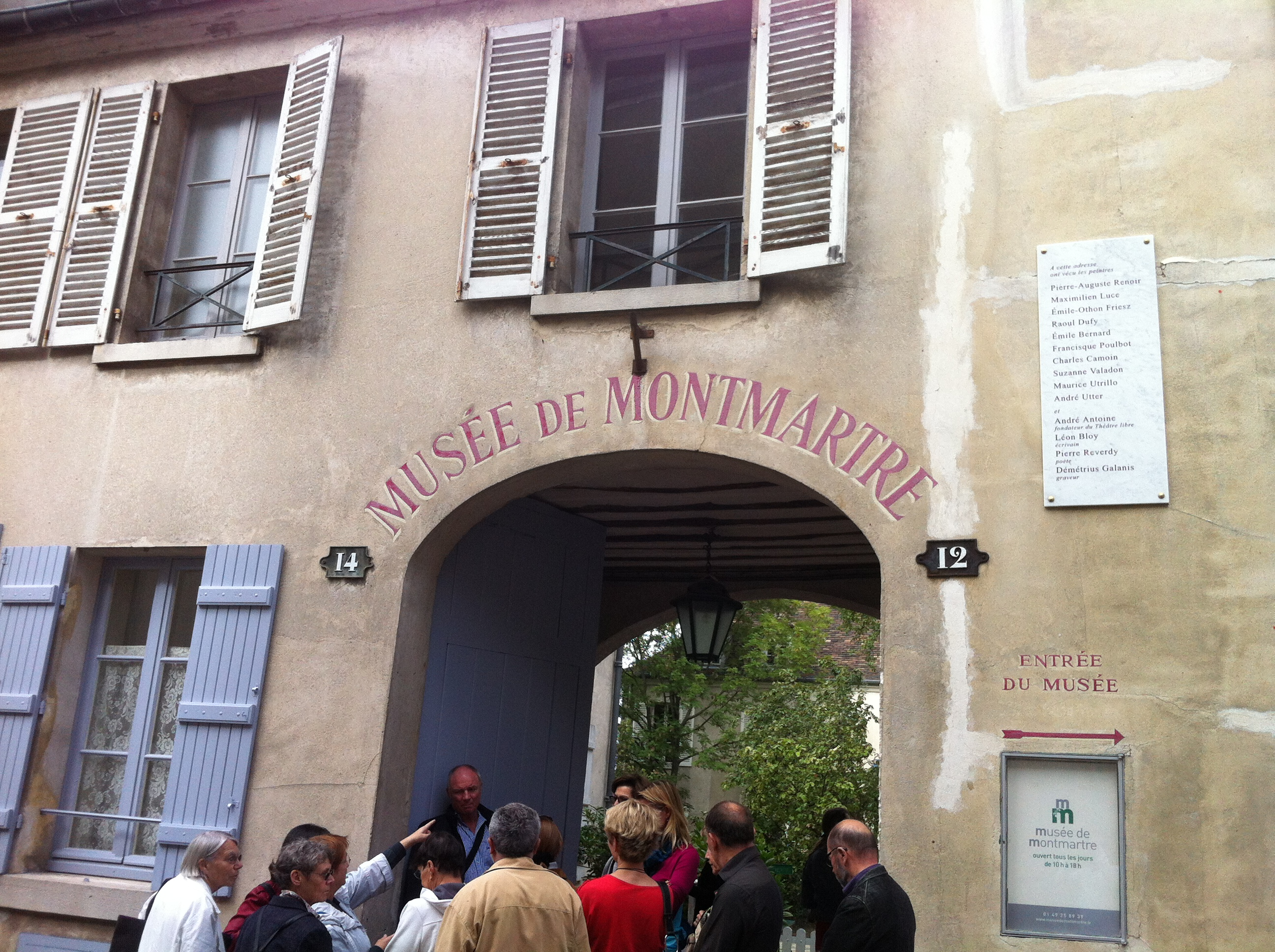 Autour du chat noir exposition au Musée de Montmartre